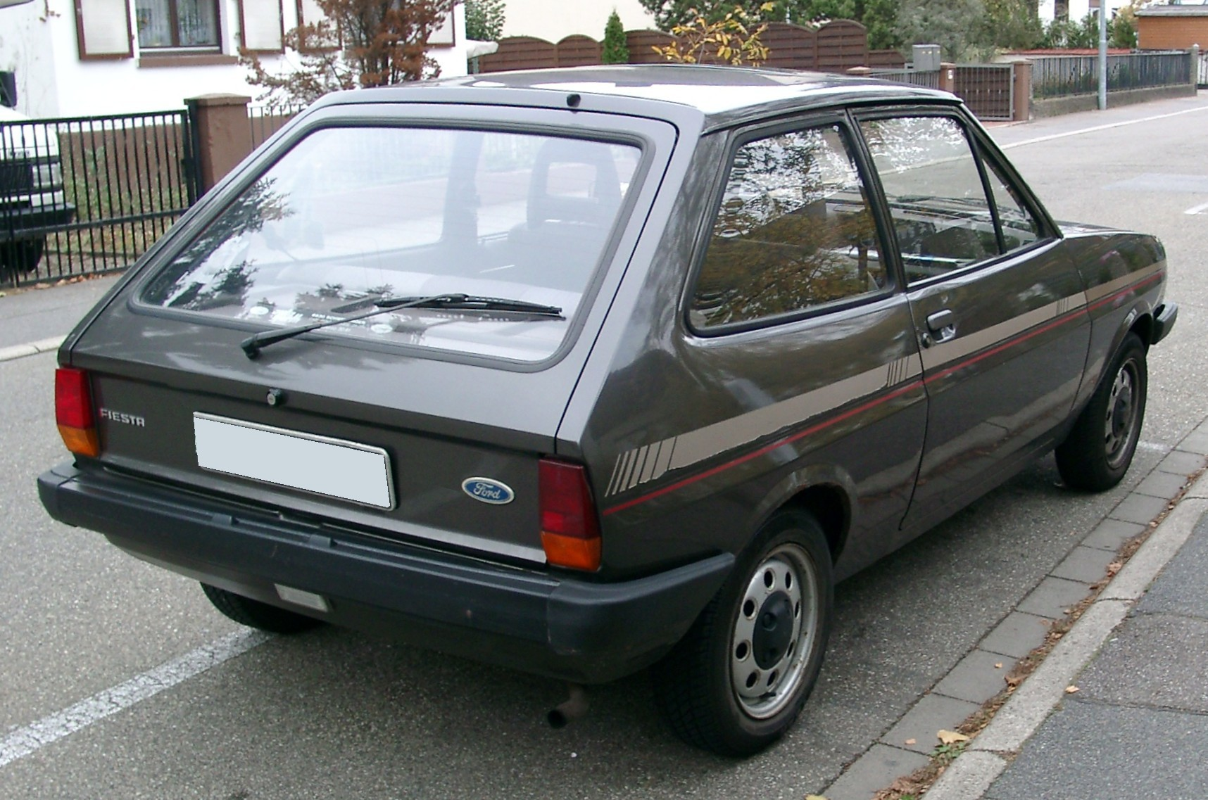 Ford Fiesta MK1